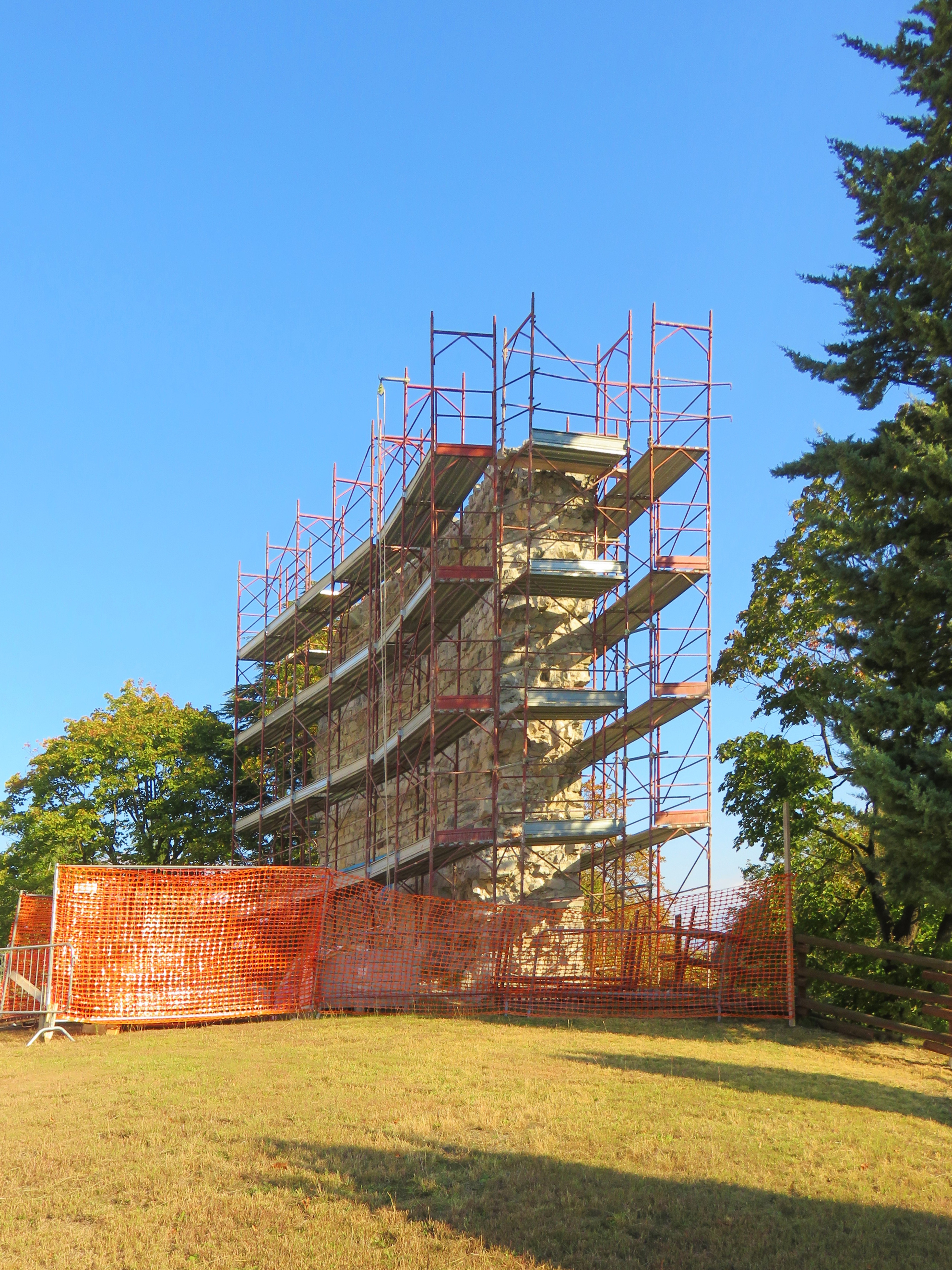 Lavori di restauro della rovina di Castel Lizzana nel settembre-ottobre 2018